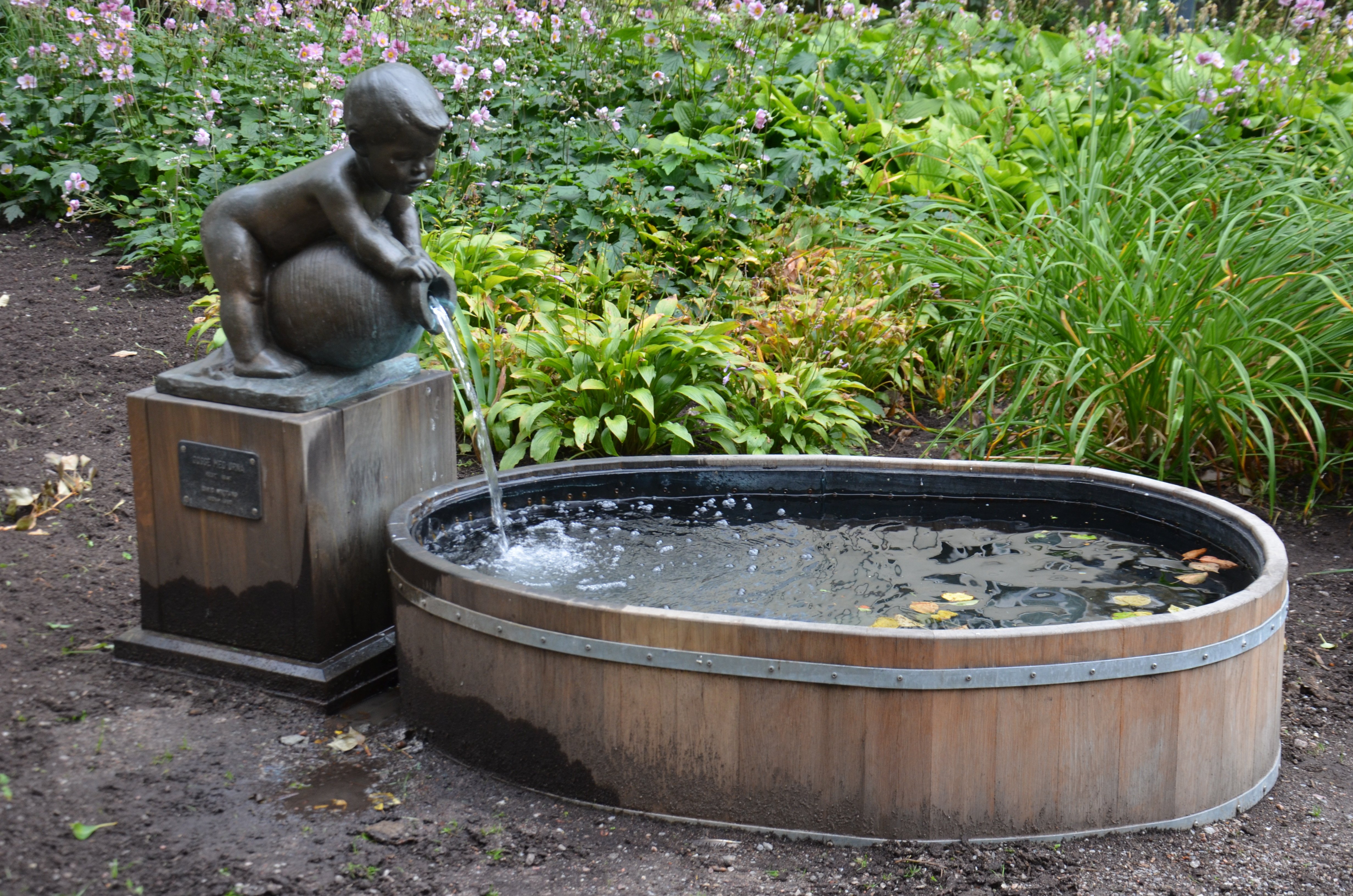 Pojke med urna av David Wretling 1981, Sysslomansparken, Kungsholmen, Stockholm